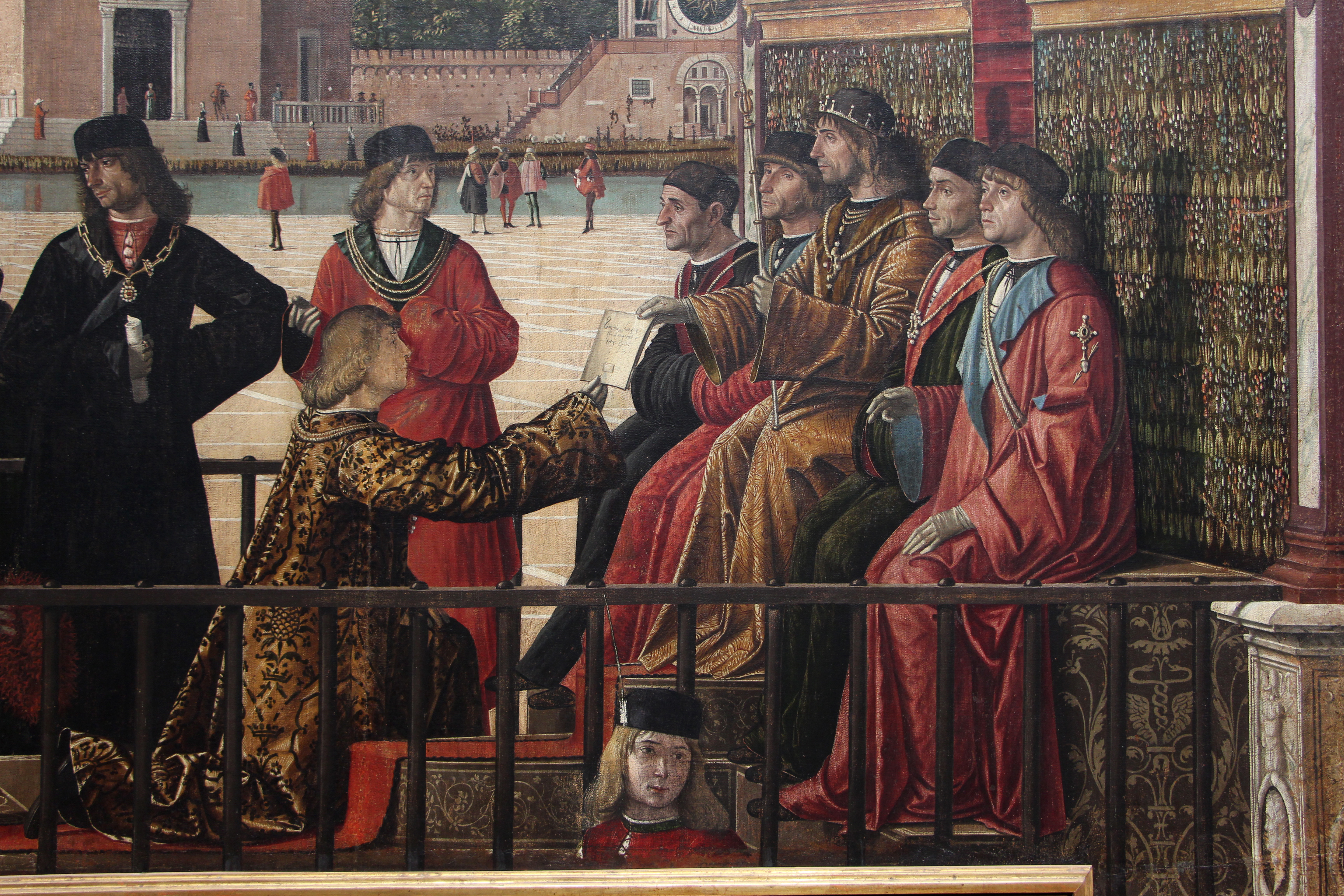 Gallerie dell'Accademia - MIBAC The making of this document was supported by Wikimedia CH. (Submit your project!) For all the files concerned, please see the category Supported by Wikimedia CH. This is a photo of a monument which is part of cultural heritage of Italy.